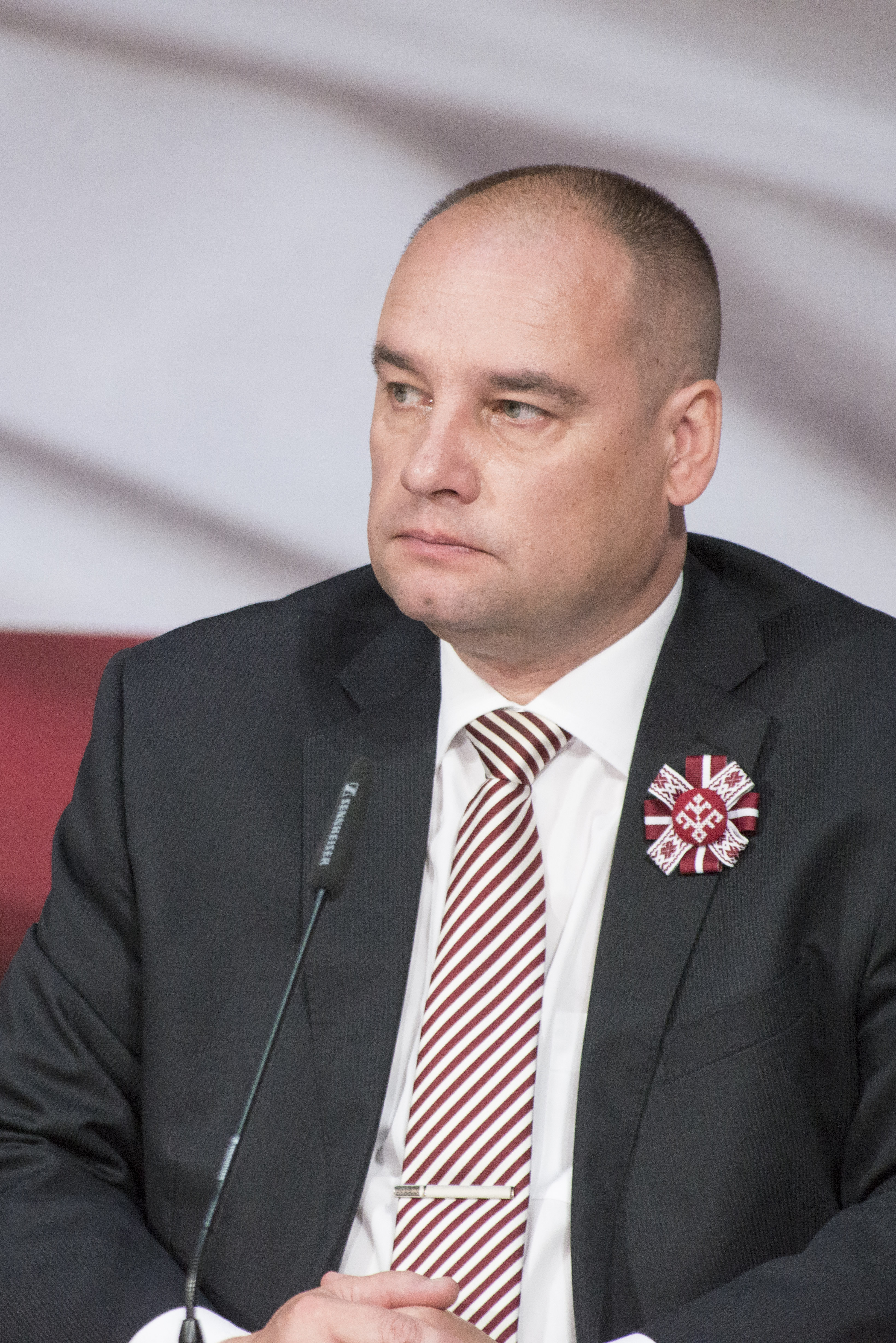 2015.gada 4.maijs. Saeimas svinīgā sēde par godu Latvijas Republikas neatkarības atjaunošanas 25.gadadienai. Foto: Reinis Inkēns, Saeimas Kanceleja Izmantošanas noteikumi: saeima.lv/lv/autortiesibas